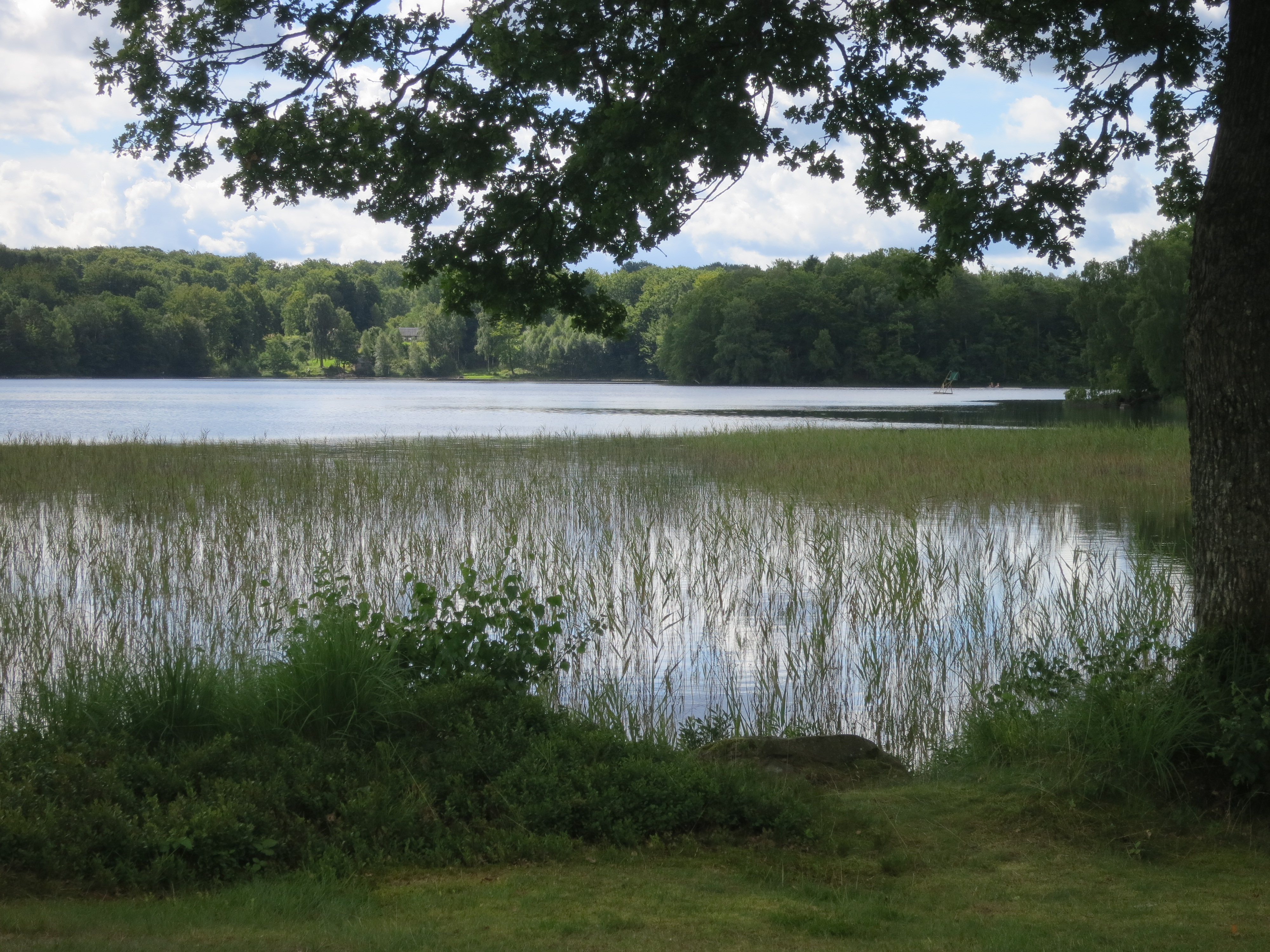 Hjälmsjön